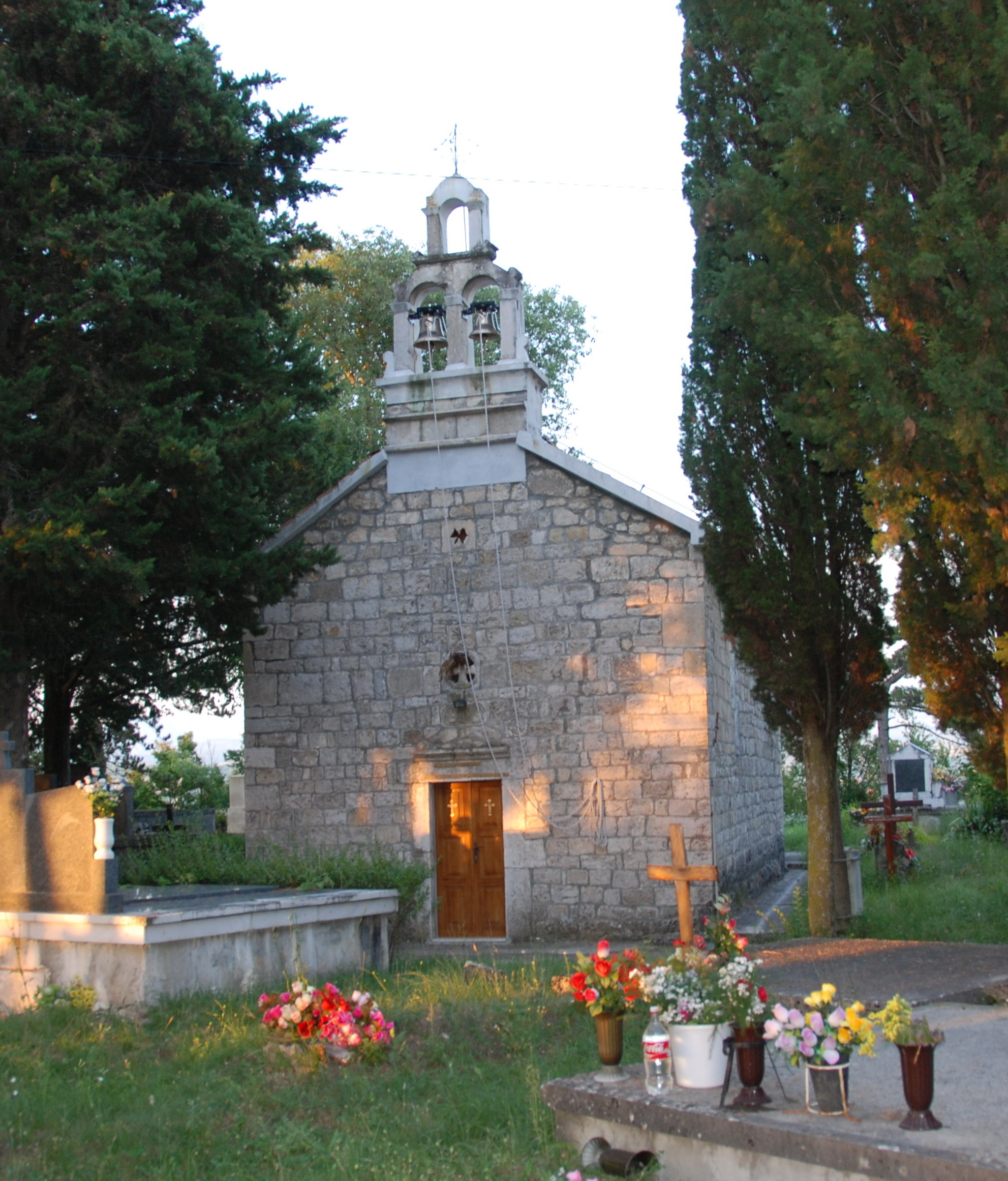 Pravoslavna crkva svetog Georgija u Kričkama kod Drniša.